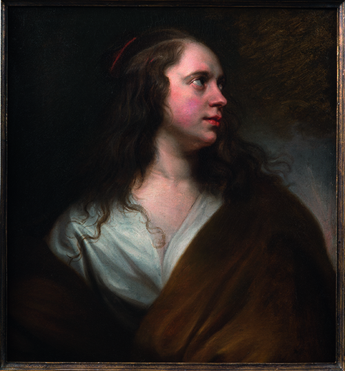 Michaelina Wautier, Portret van een vrouw, ?, olieverf op doek, 62,5 x 57,6 cm.